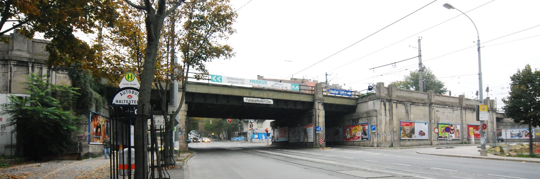 Die Brücken über die Linzer Straße und die Schloßallee im 14. Wiener Gemeindebezirk Penzing. Die Südansicht der Brücke über die Schloßallee